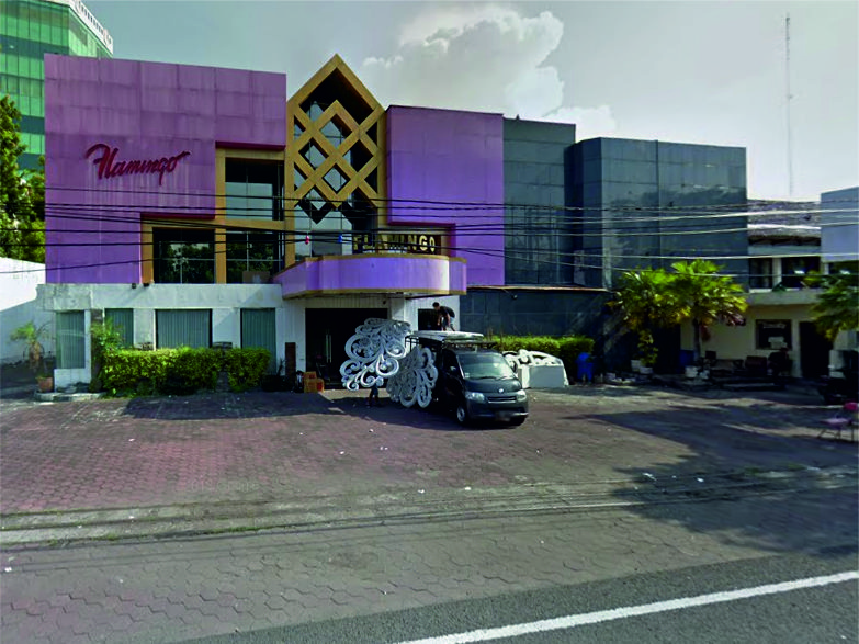 Model gedung Flamingo saat Flamingo menjadi gedung serbaguna